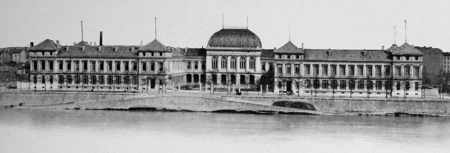 Dictionnaire illustré des communes du département du Rhône. Tome 2 / par MM. E. de Rolland et D. Clouzet.